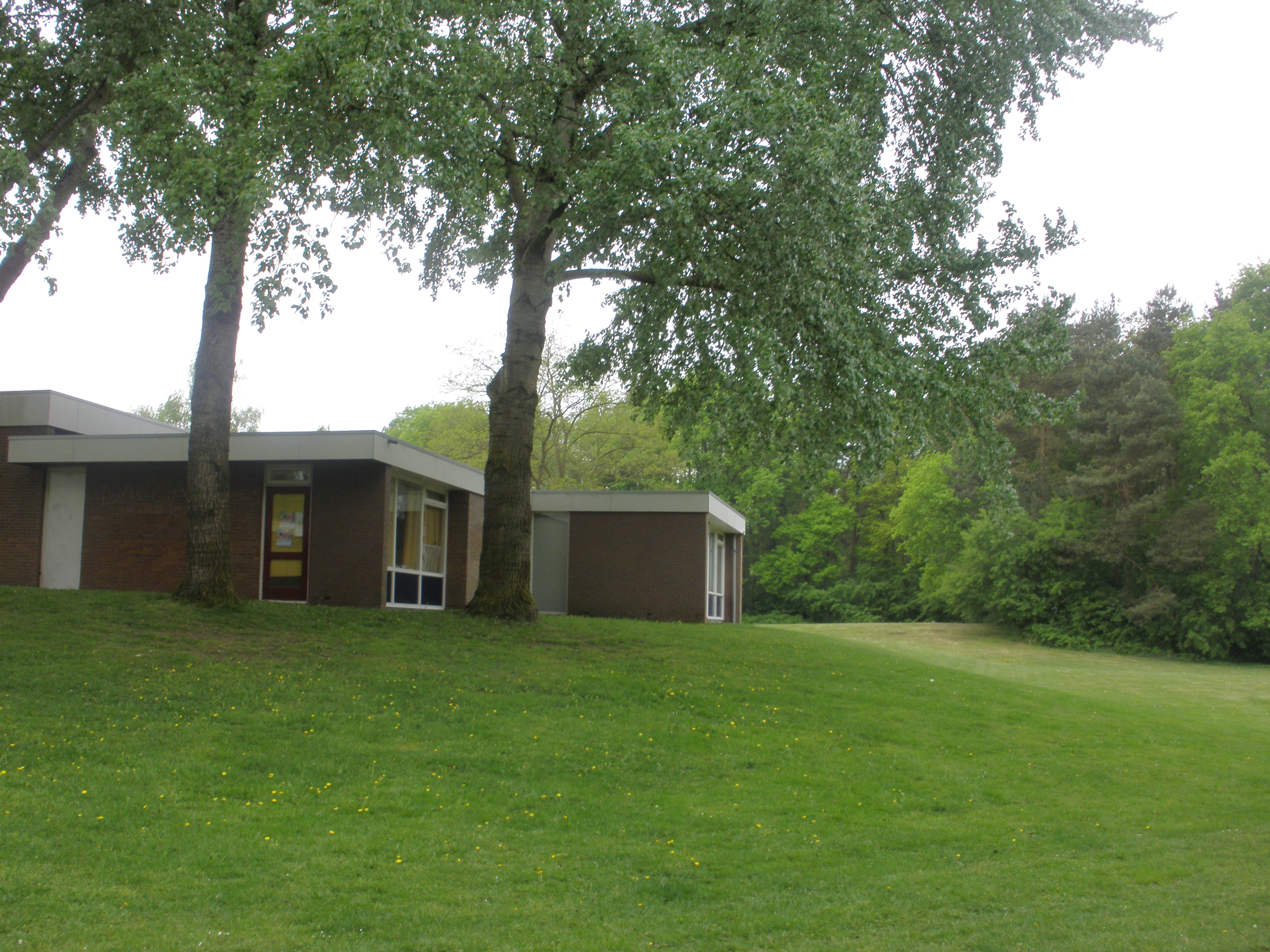 Voormalig kleutergebouw van De Eekharst in de wijk Emmerhout van Emmen. Het gebouw staat op een heuvel. In de winter glijden kinderen met de slee naar beneden.